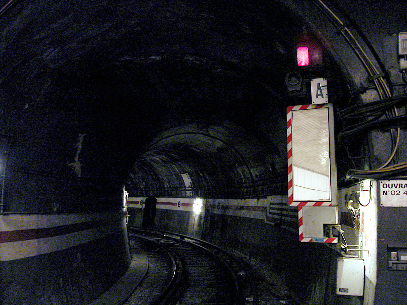 Station Porte Dauphine de la ligne 2 du métro de Paris, France. Boucle de retournement, la courbe de 30 m de rayon du réseau est la plus serrée du réseau.